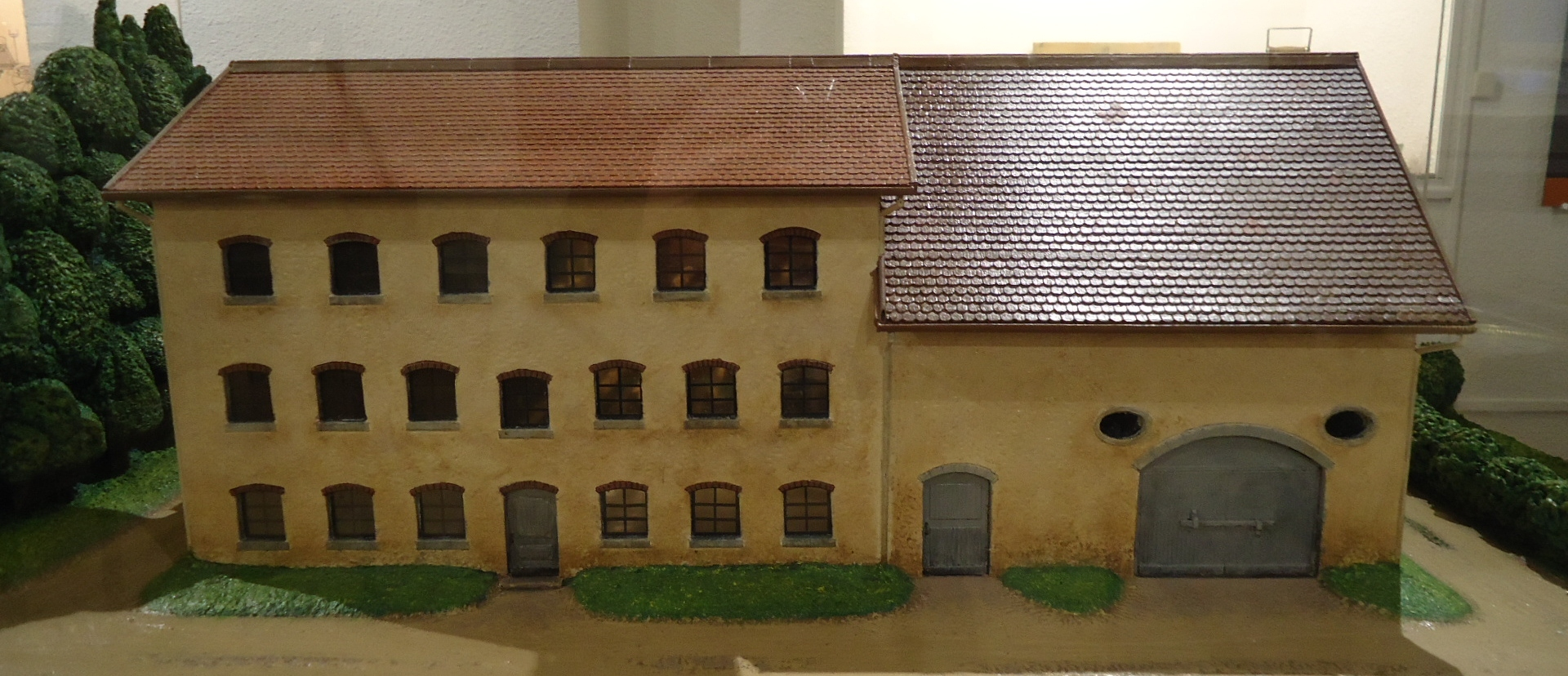 Maquette du premier bâtiment Japy construit en 1777 exposée au Musée Frédéric Japy